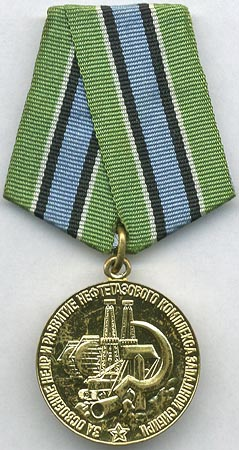 Медаль «За освоение недр и развитие нефтегазового комплекса Западной Сибири»